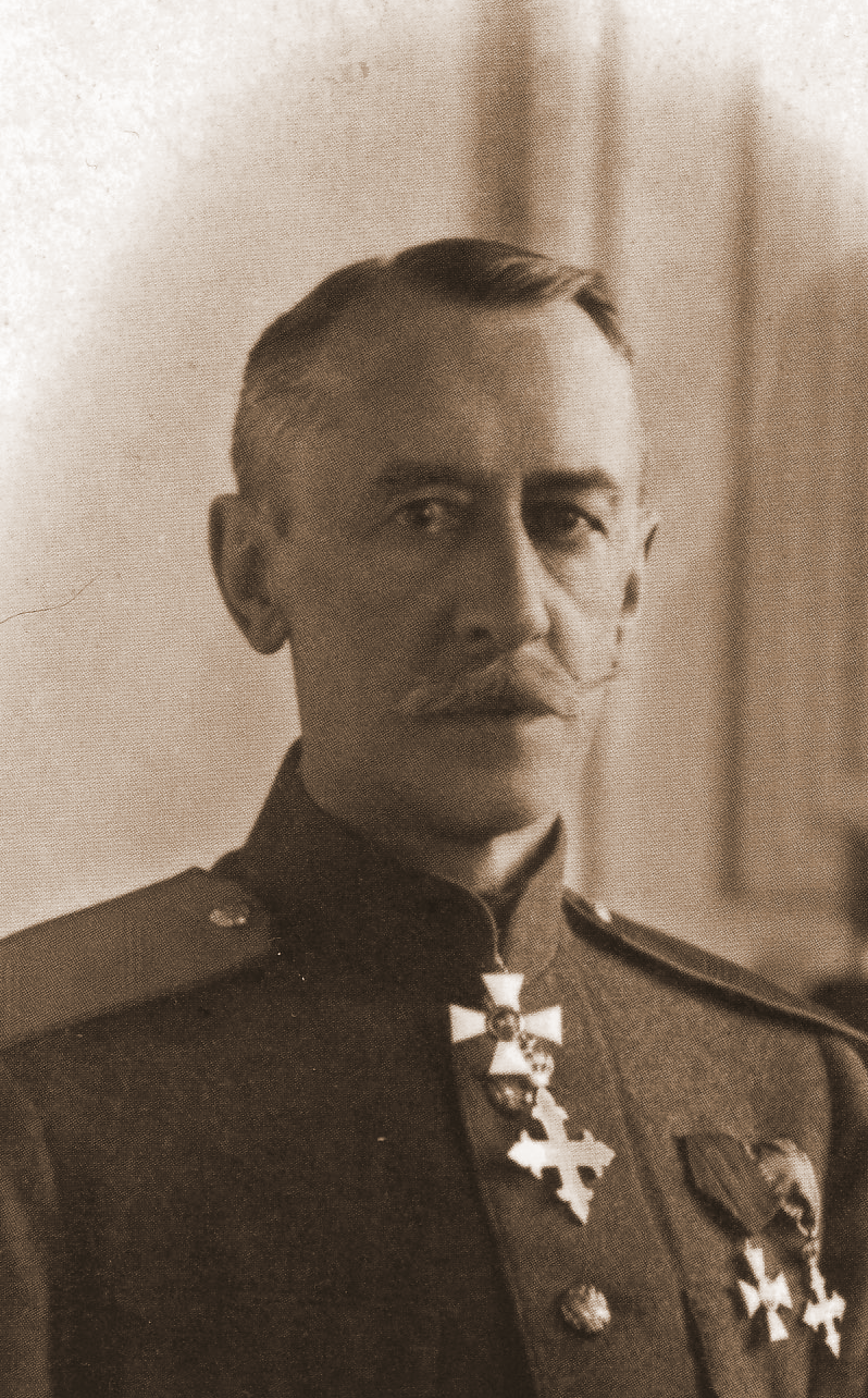 Generalul rus Dmitri Şcerbaciov comandantul trupelor ruse de pe frontul românesc în Primul Război Mondial